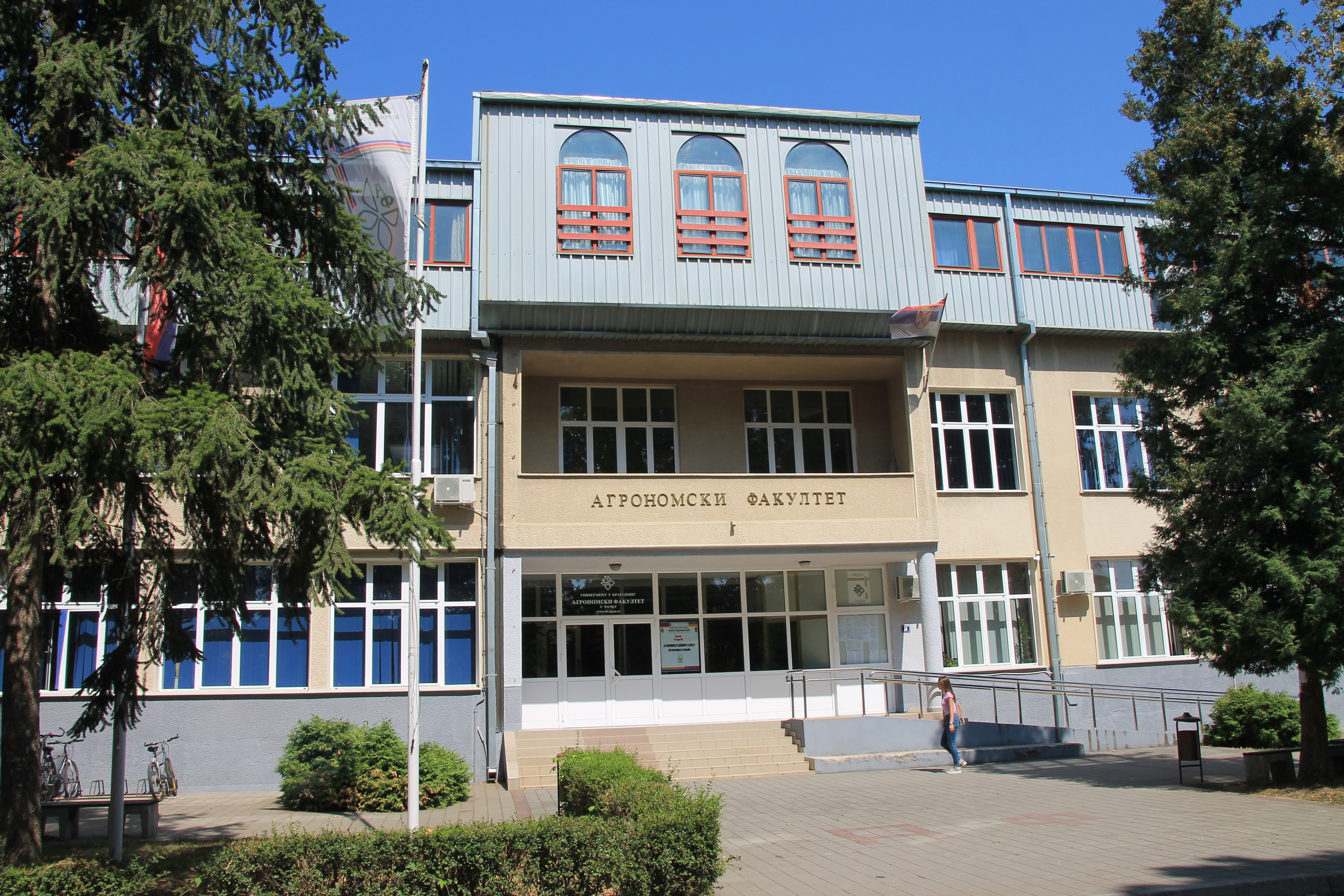 Agronomski fakultet Čačak